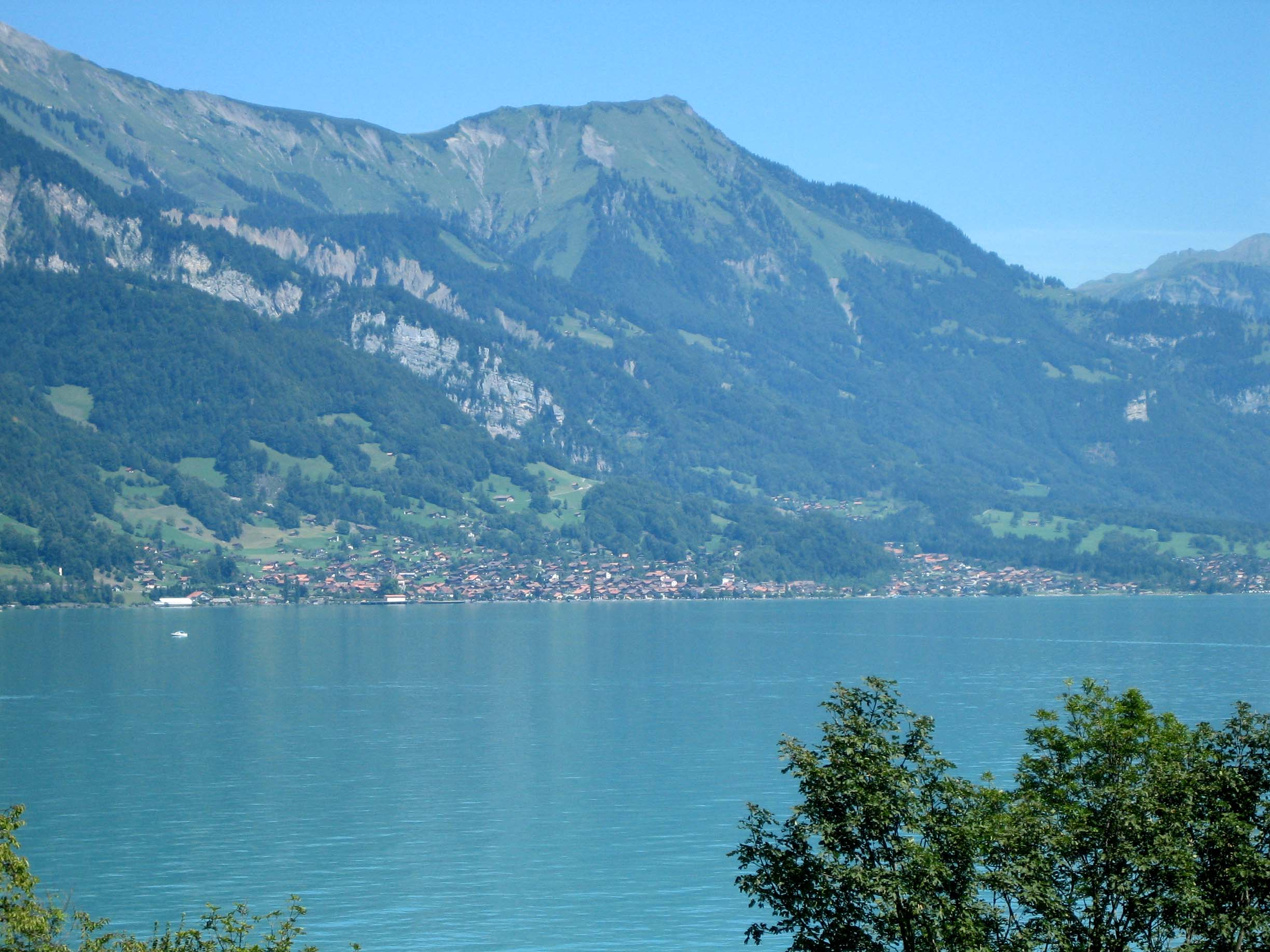 Brienz